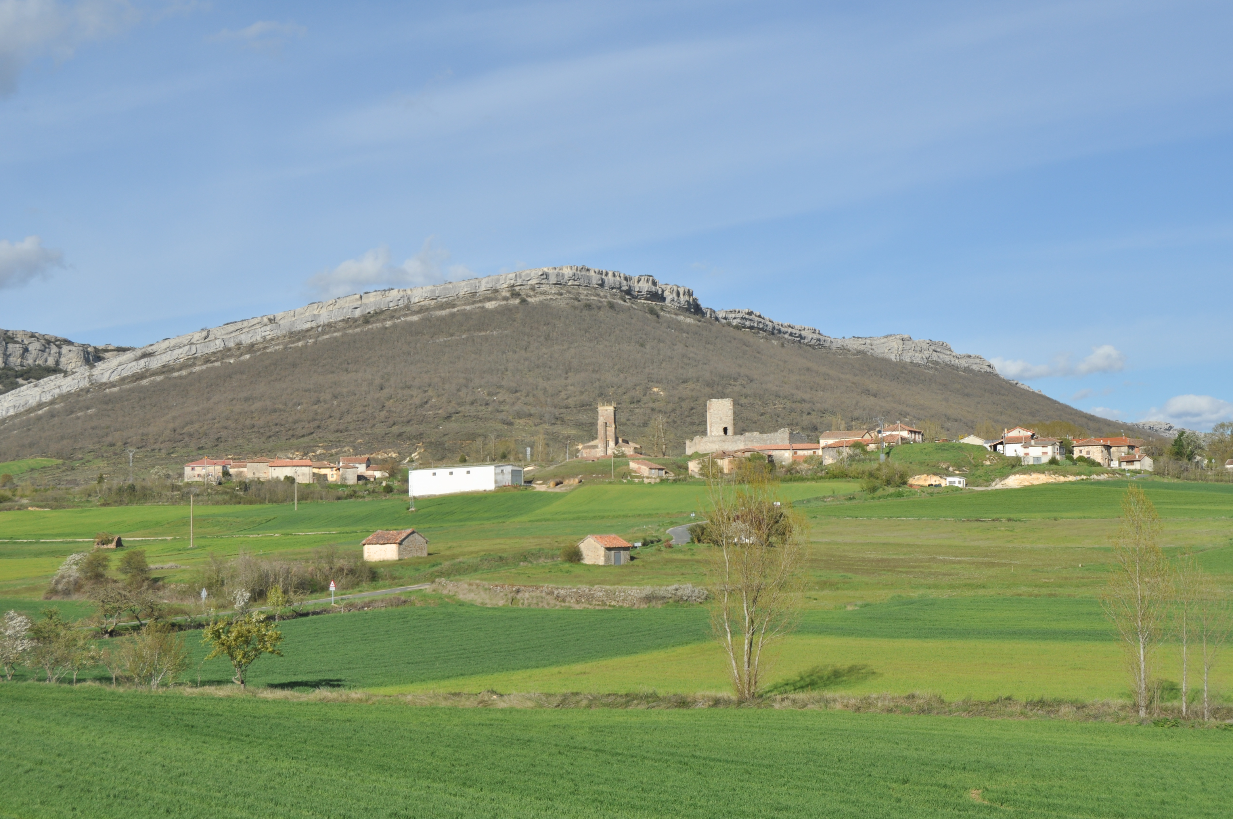 Rebolledo de la Torre - 001